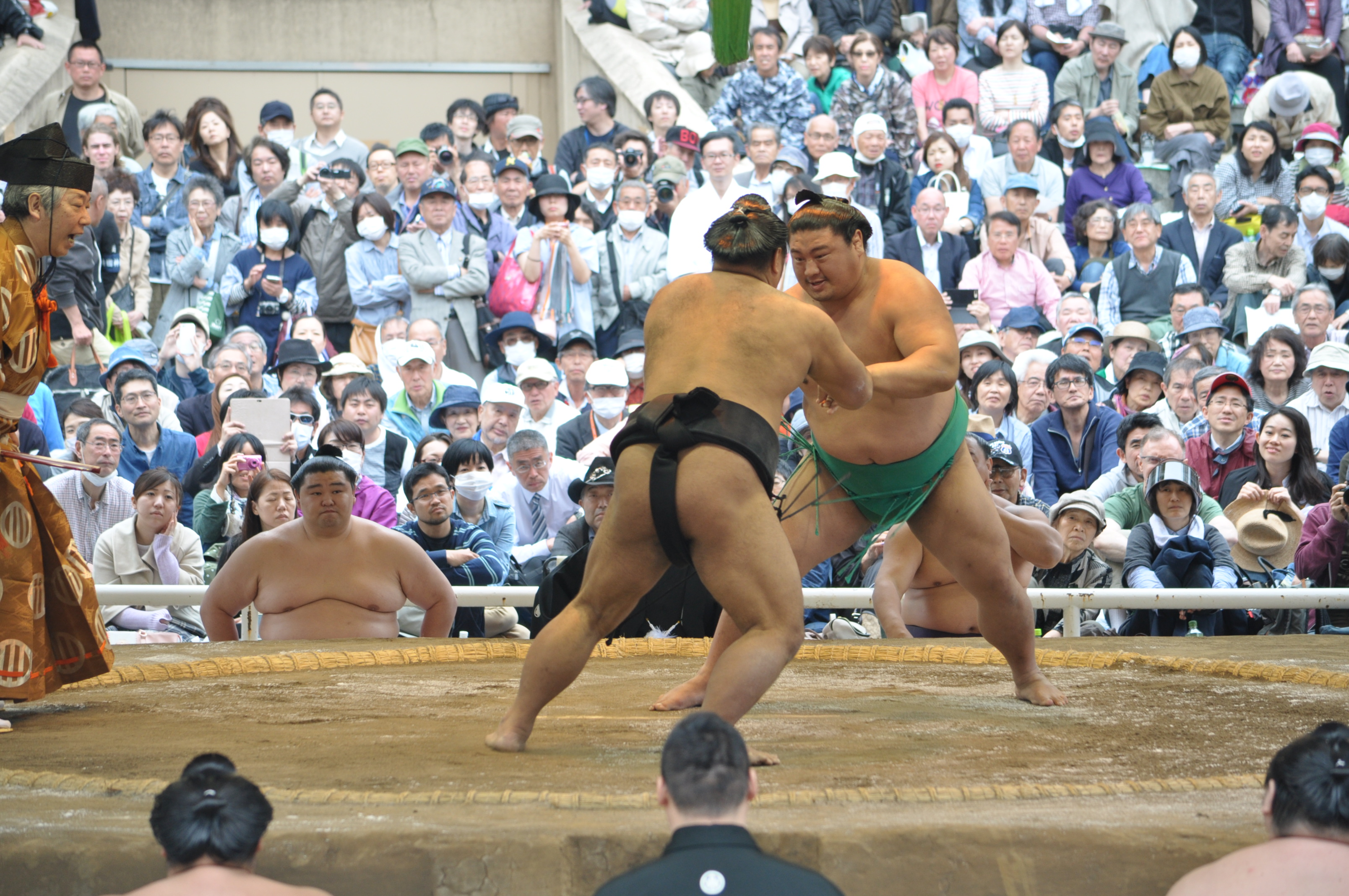 嘉風 雅継